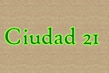 Palabra Ciudad 21